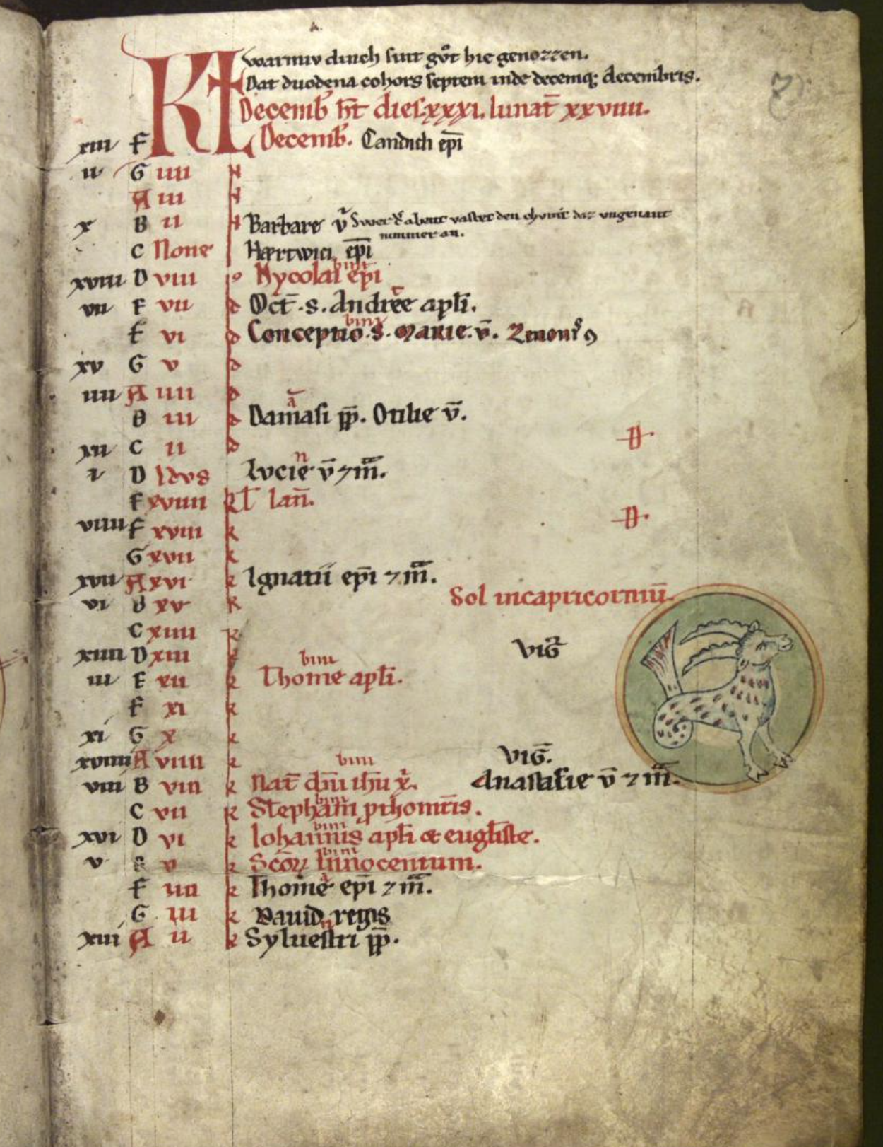 UBG Ms 278, fol. 7r., Monat Dezember